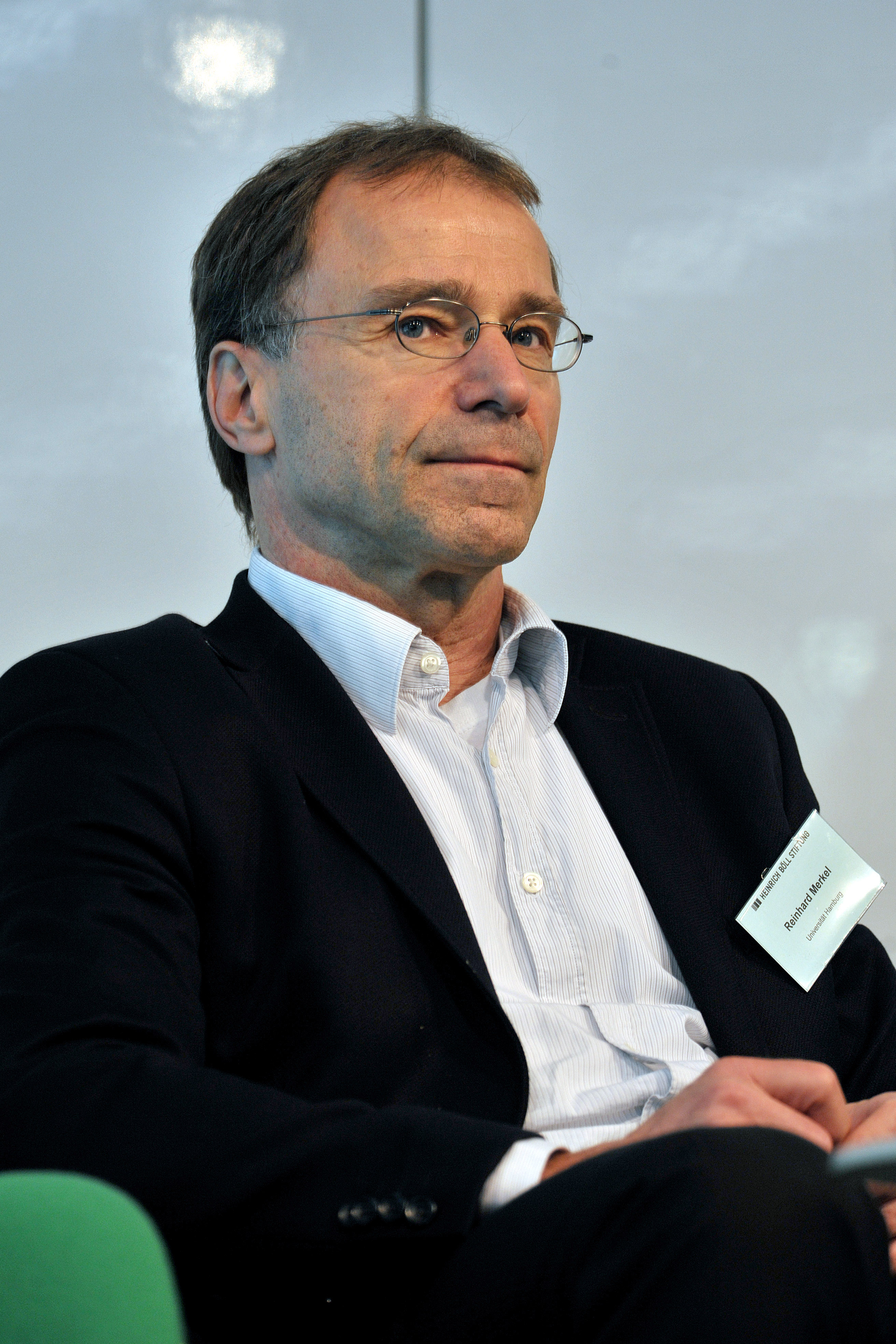 Prof. Dr. Reinhard Merkel, Universität Hamburg, Fakultät für Rechtswissenschaften. Foto: Heinrich-Böll-Stiftung/xpress